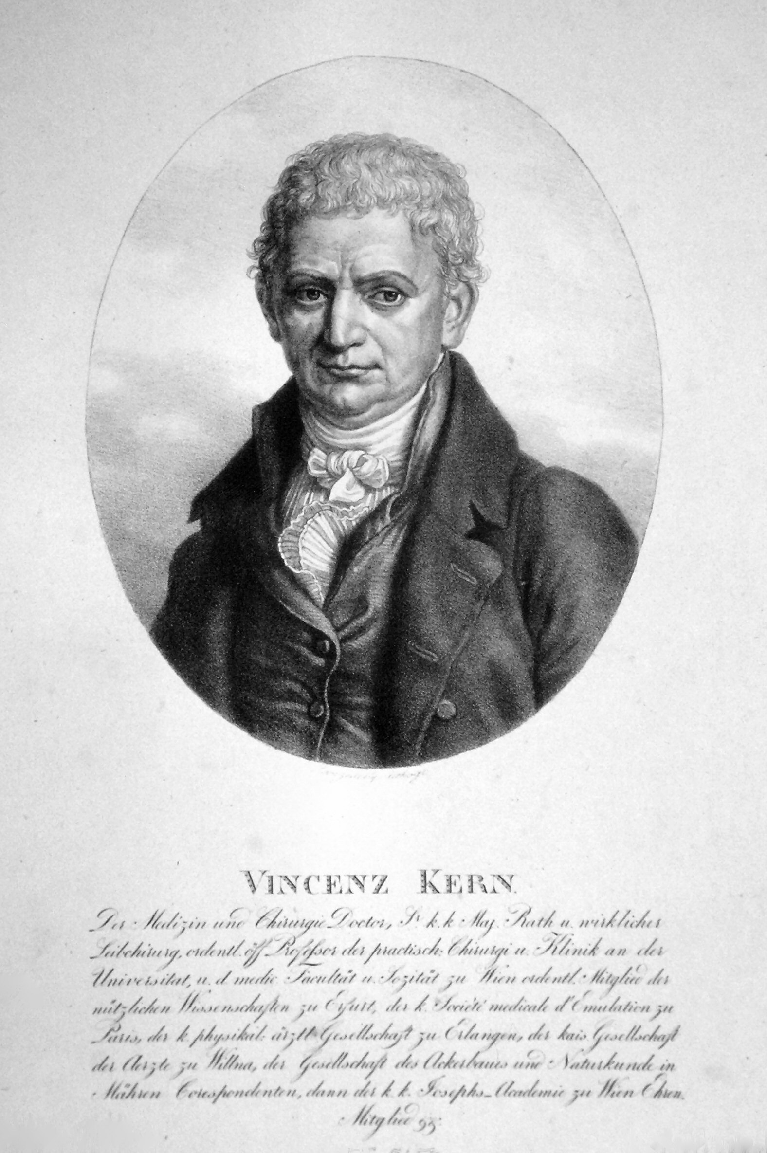 Vincenz von Kern (1760-1829), Arzt, Chirurg.Lithographie von Josef Lanzedelly d. Ä., ca.1820